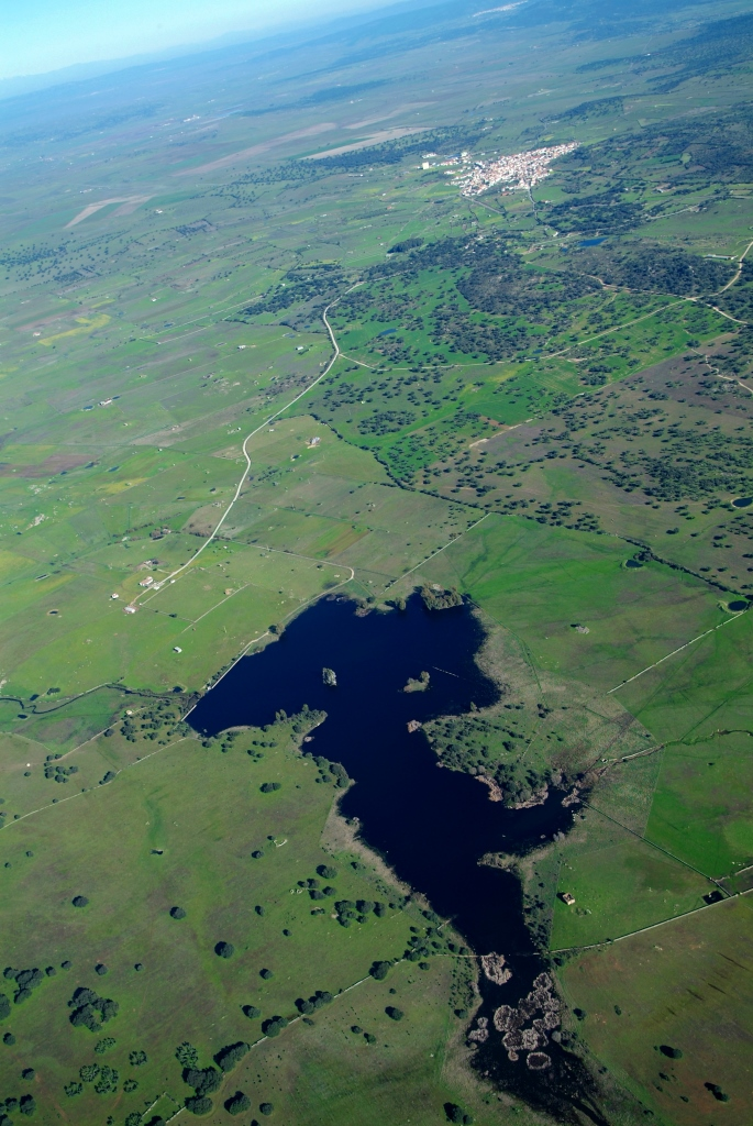 Término